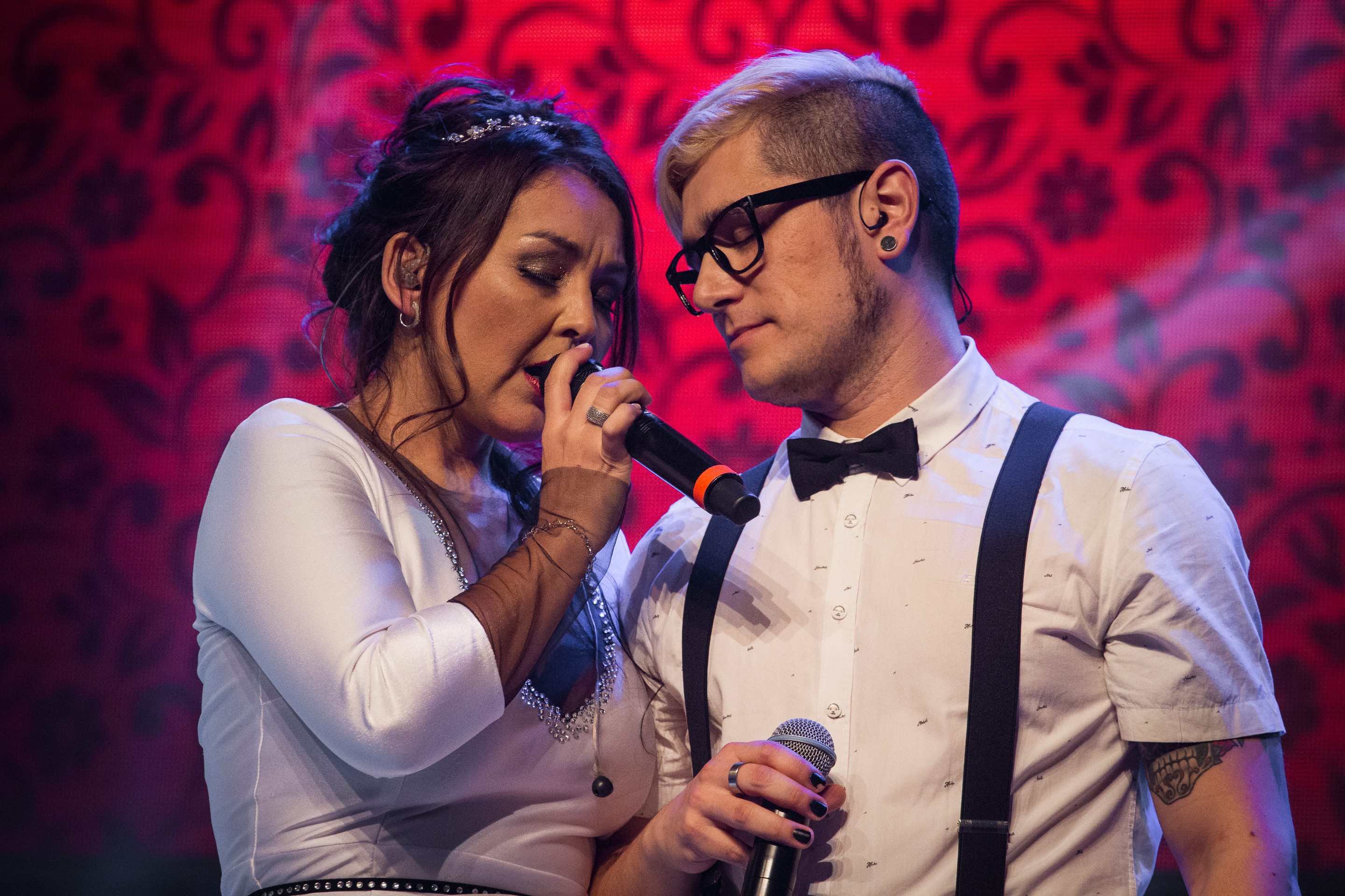 Denisse Malebrán cantando con Carlos Azocar en el concierto de Saiko en el Teatro Nescafé de las Artes